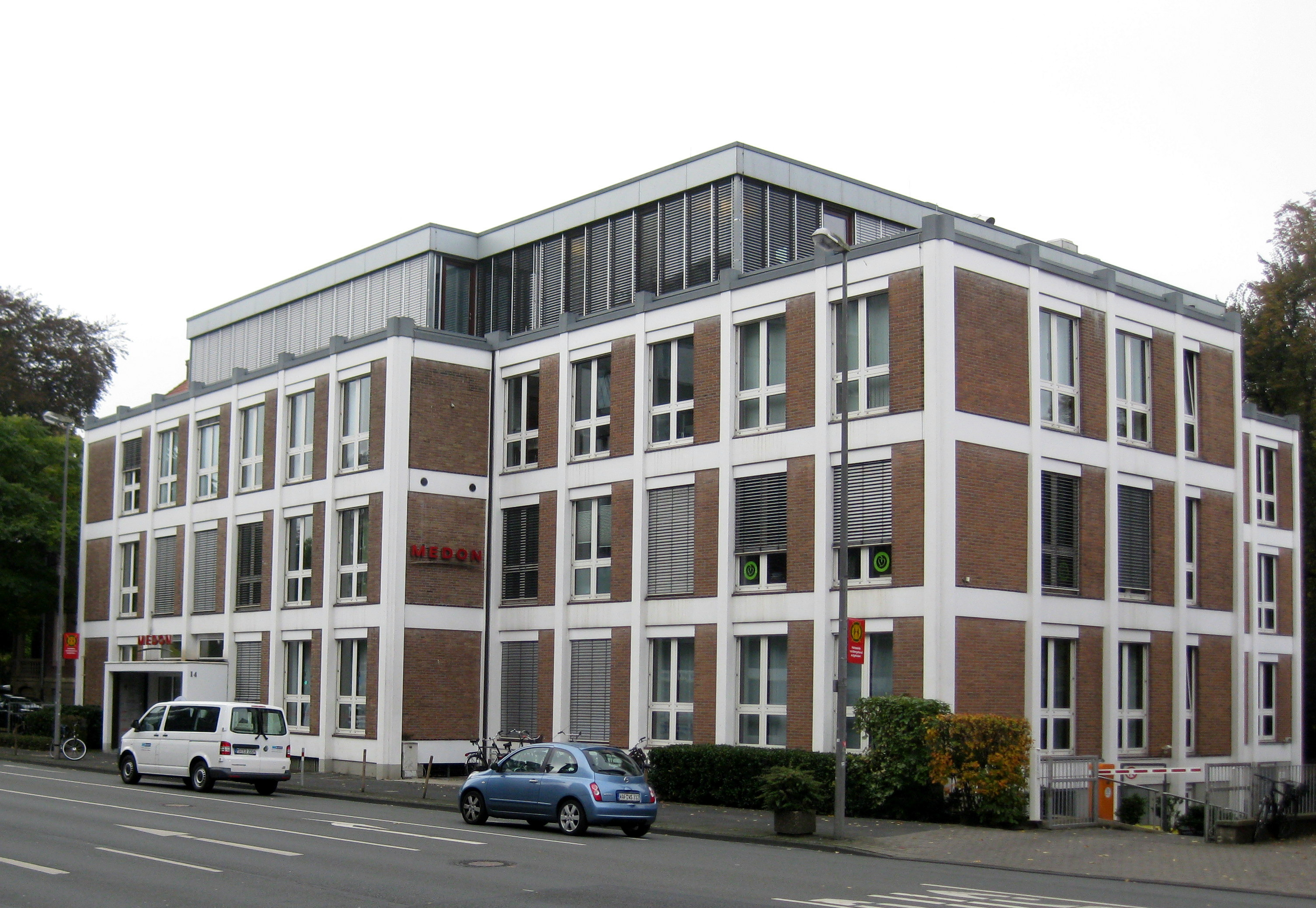 Ausgefacher Stahlbetonskelettbau der Westdeutschen Nachkriegsmoderne, aufgestockt und "modernisiert"